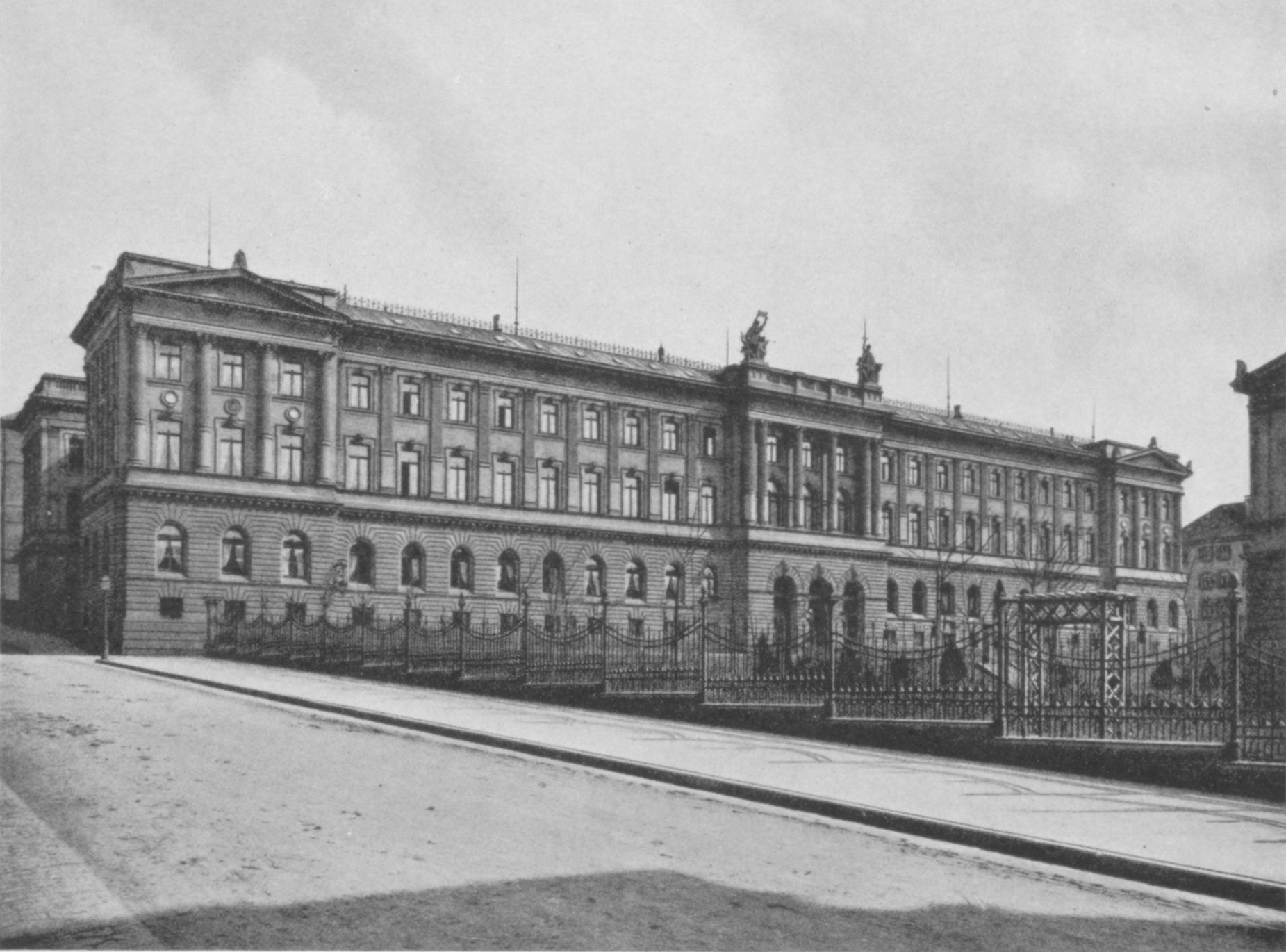 Ehemaliges Justizgebäude, Stuttgart, Urbanstraße zwischen Ulrichstraße und Archivstraße. Architekt: Theodor von Landauer, Baujahr: 1875-1879, 1944 zerstört, Foto 1889.